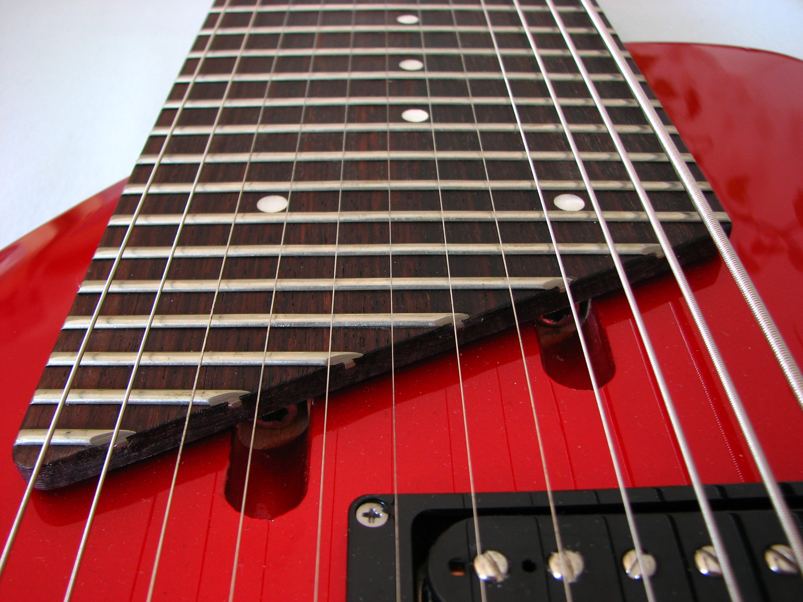 Hier kann man von links (6 Melody-Saiten, in aufgehenden Quarten gestimmt: C#, F#, B, e, a, d) nach rechts (6 Bass-Saiten in Quintenstimmung: h, e, a, D, G, C) gut die im Text bereits beschriebene Saitenbestückung bzw. das Leersaiten-Tuning erkennen.